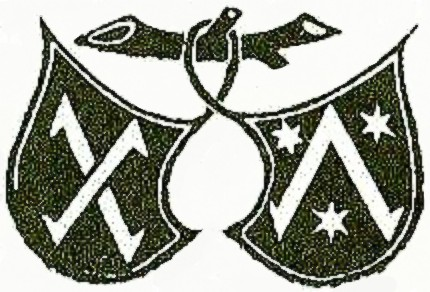 Emblem or mark of Schöffer & Fust Printers